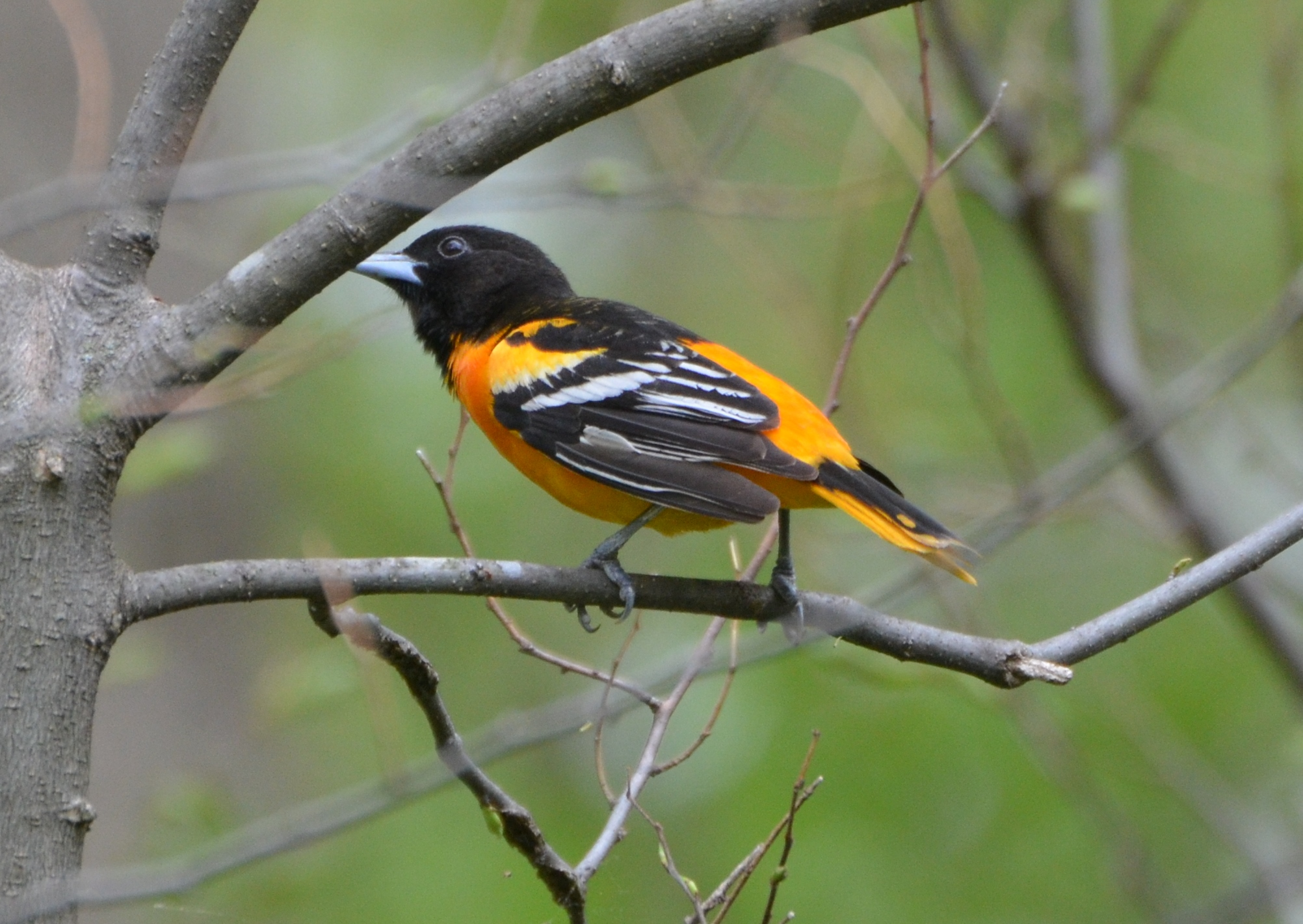 Emmenegger Nature Park 4/27/14